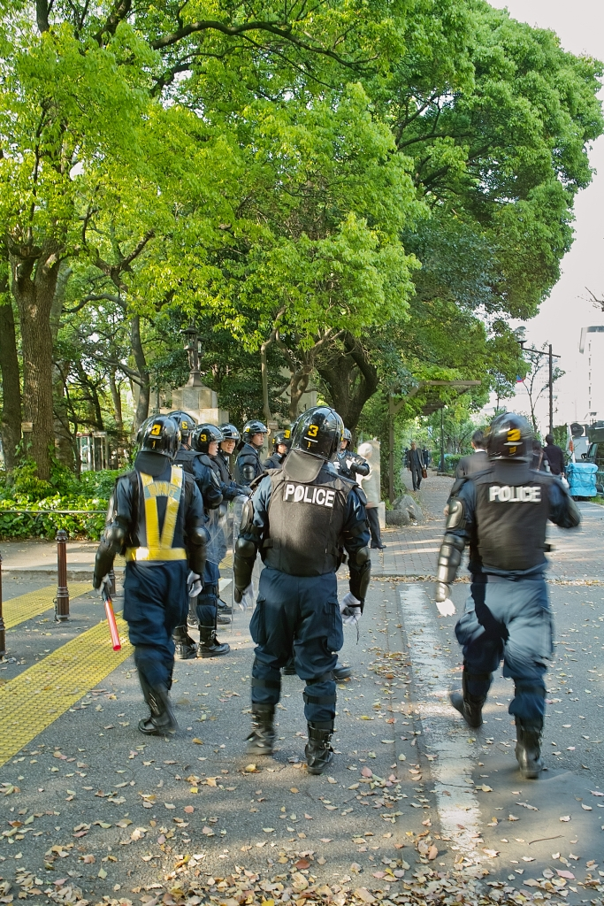 Riot police in Hibiya, Tokyo, Japan.